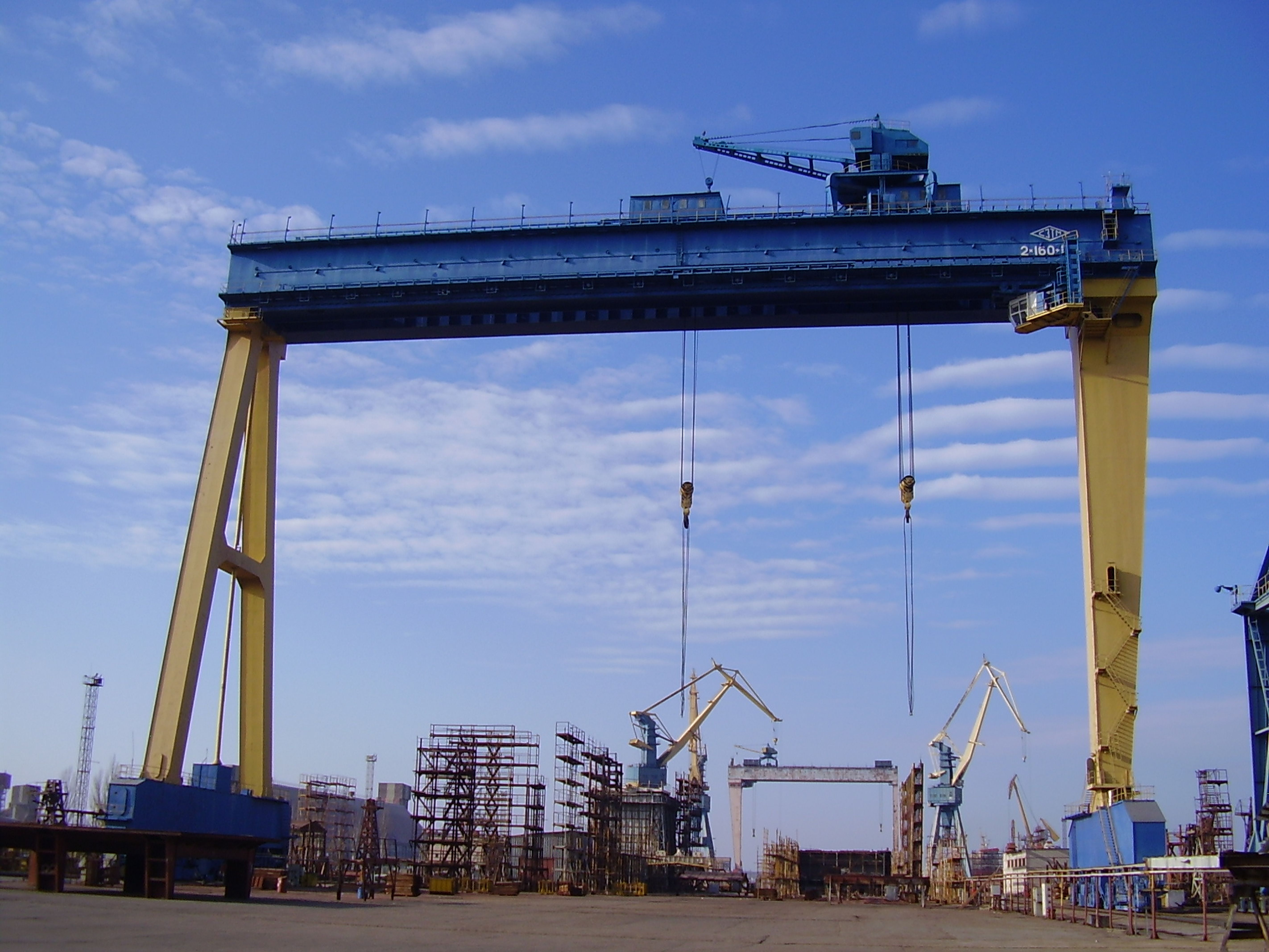 Вантажний кран заводу "Океан", м.Миколаїв Миколаївська весна у Вікіпедії